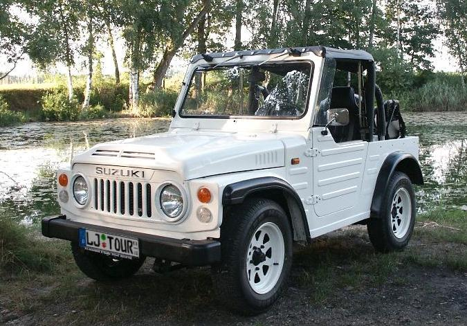 Suzuki LJ80 BJ.1980 39PS 795ccm